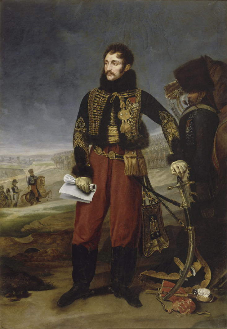 Sur la droite, représentation d'un aide de camp de profil fumant (hussard 5e régiment). En arrière plan, représentation du 7e régiment de hussards.